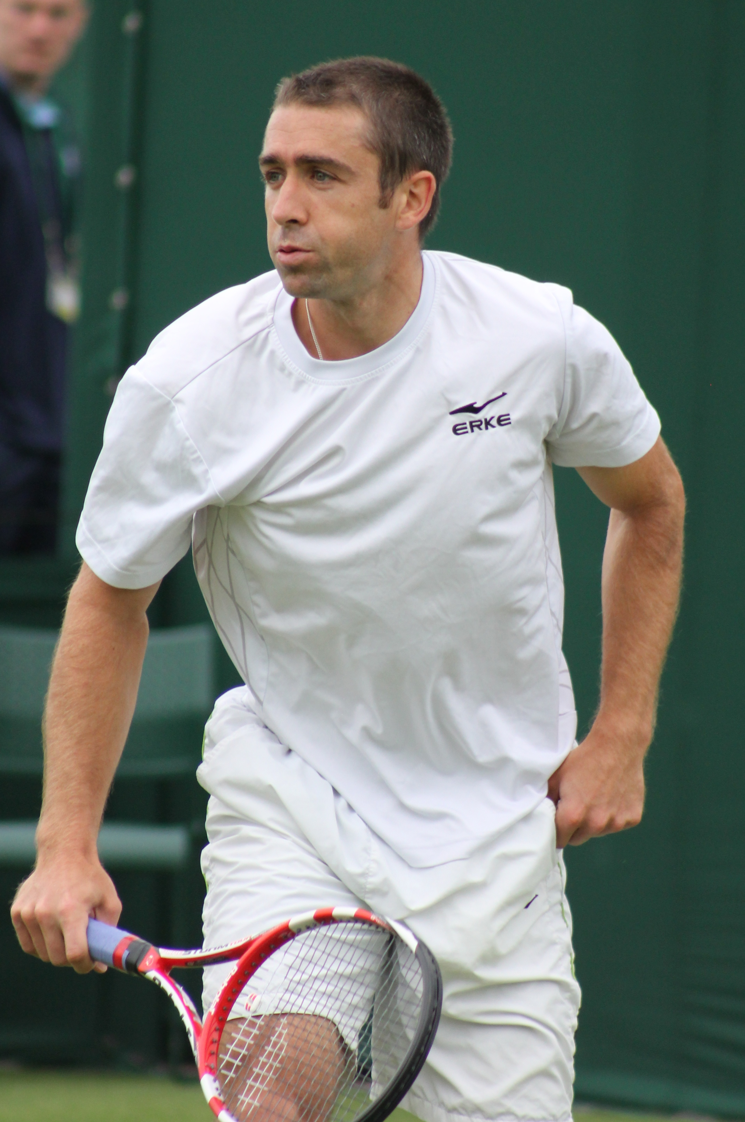 Becker WM13-012